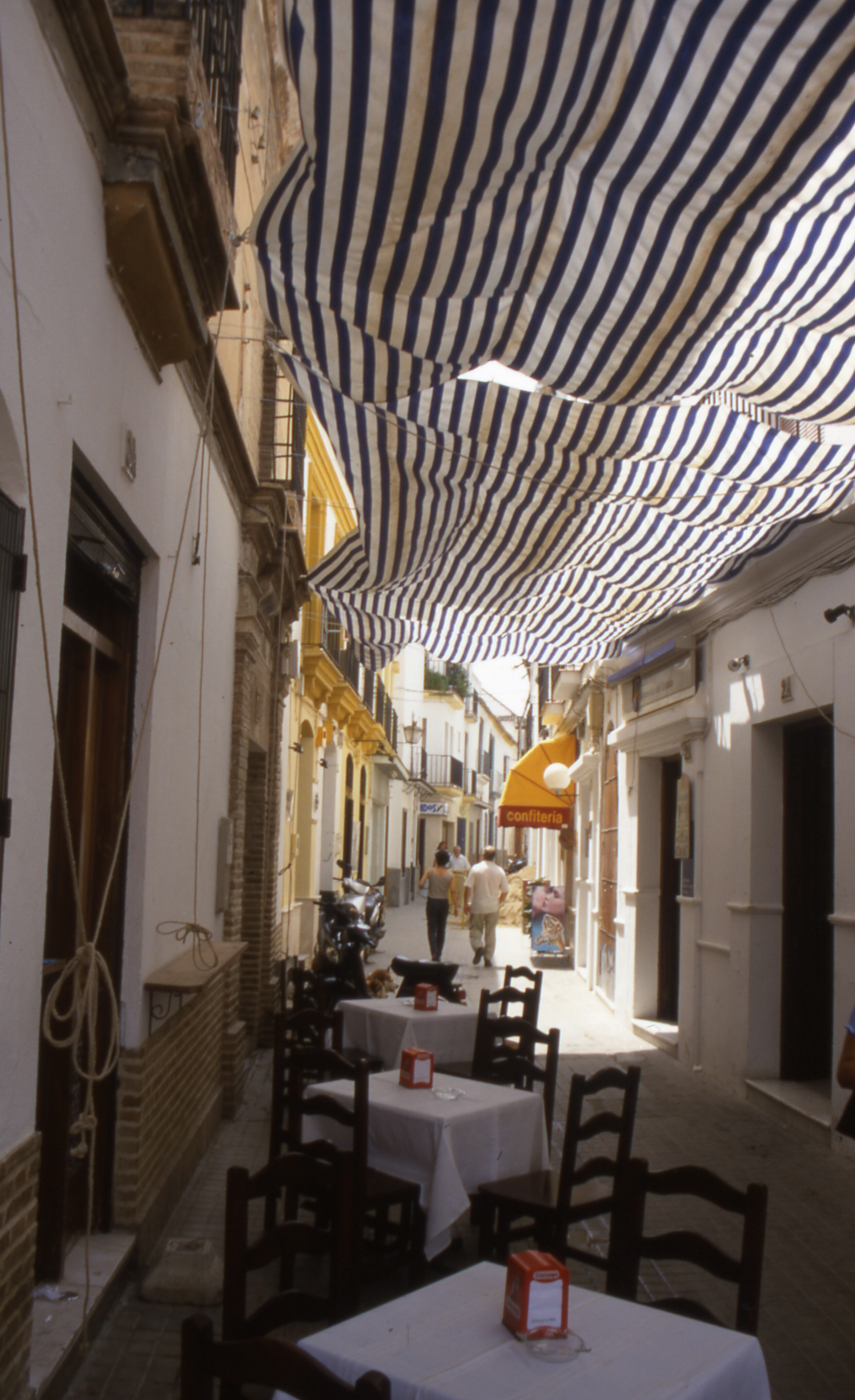 Écija Ansicht 1